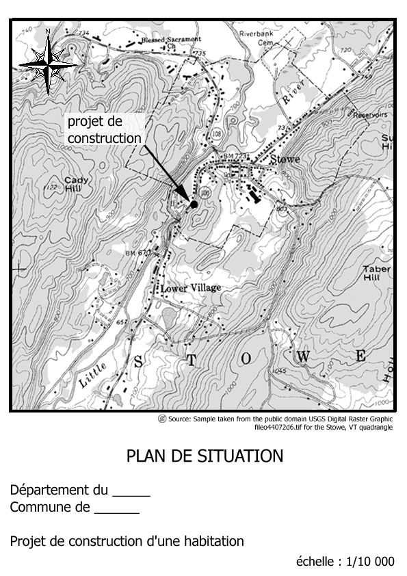 Exemple de plan de situation. Source carte: Image:Topographic_map_example.png 15 Hameau Meslin, 50270 Saint Maurice en Cotentin